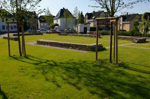 Mauerverlauf der alten Barbara-Kirche am Alter Markt in Reusrath